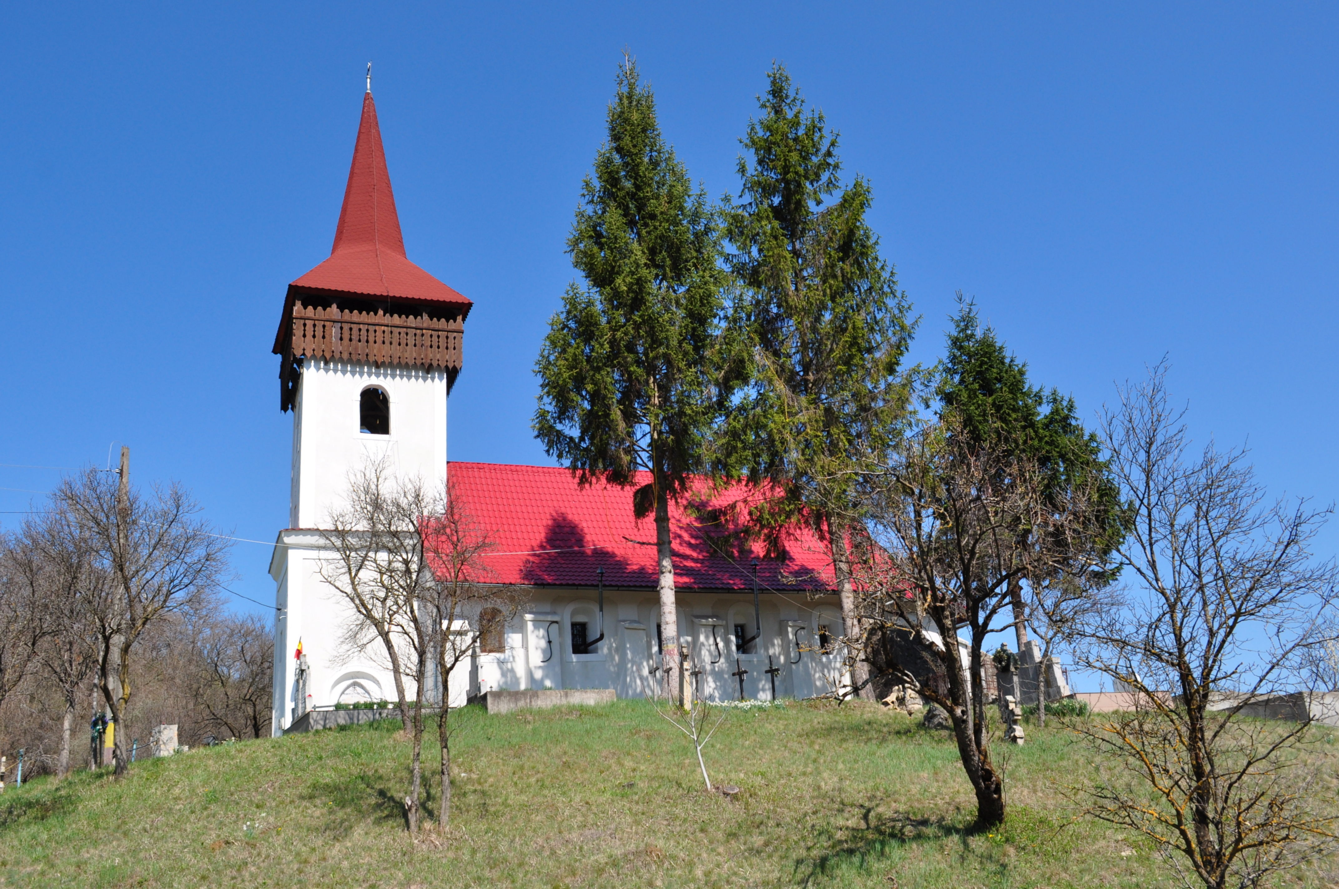 Biserica "Buna Vestire", sat ROŞCANI; comuna DOBRA